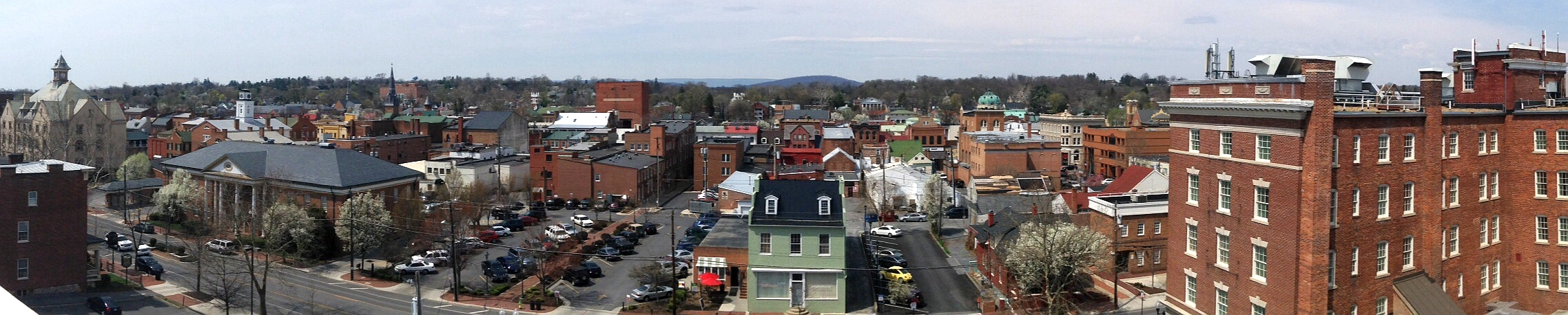 Winchester